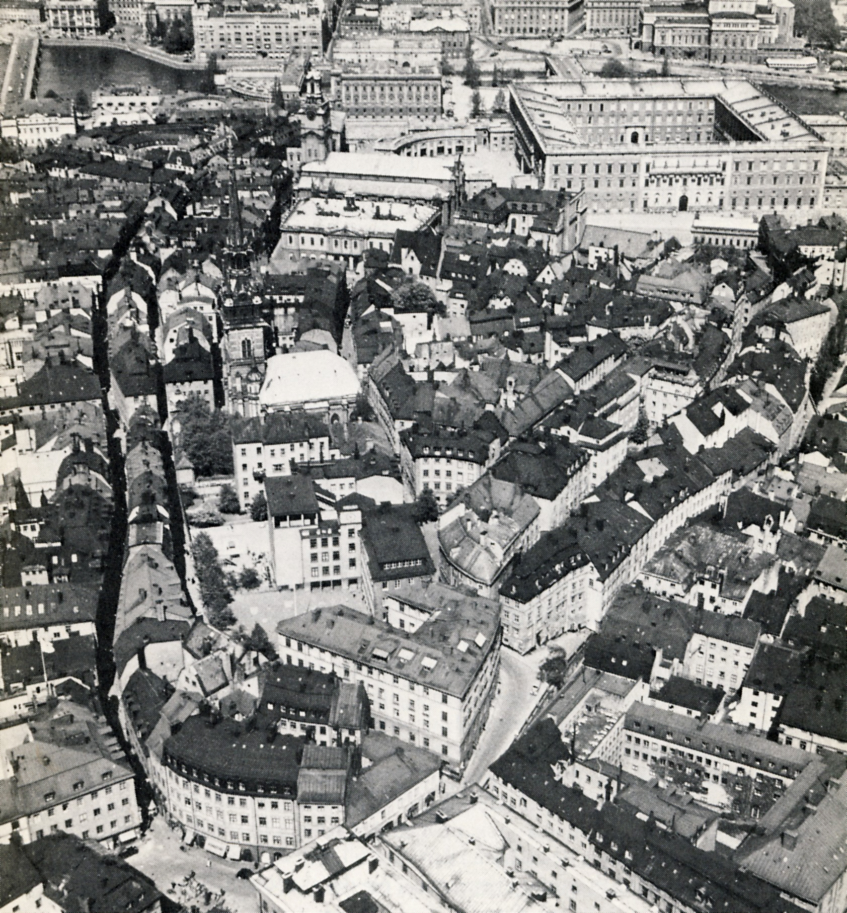 Gamla stan, Stockholm, flygfoto, närmast Järntorget, Slottet i bakgrunden